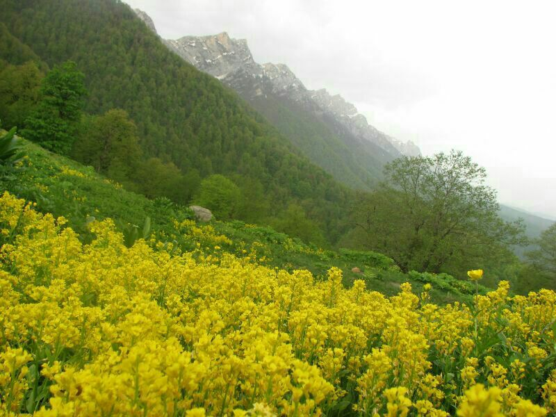 روستای پاجی میانا منطقه خاروندی جینگاه